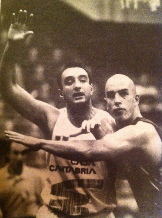 Fotografia 1 - Jugando en un partido. Es el de la izquierda.